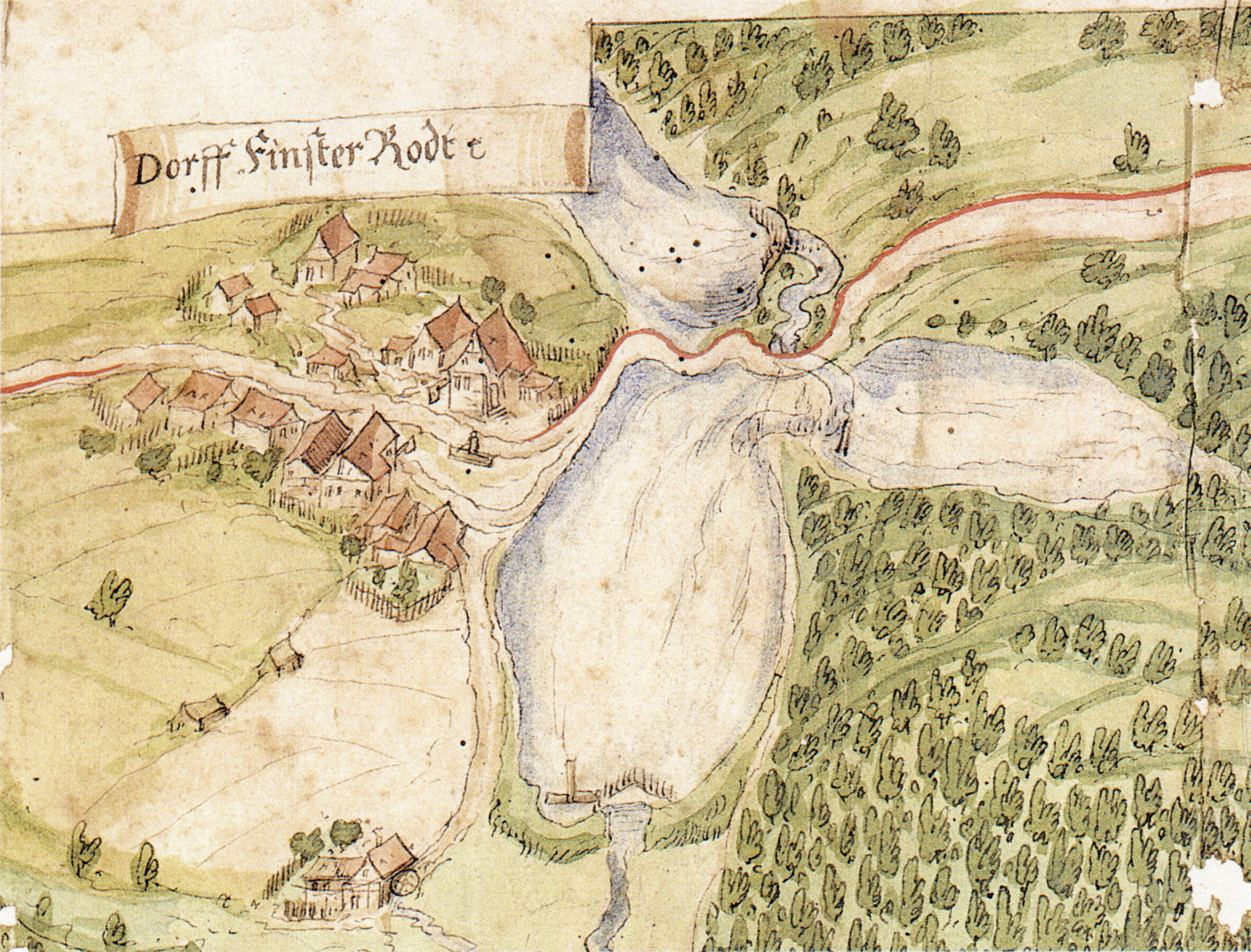 Darstellung des Dorfes Finsterrot, heute Gemeinde Wüstenrot, auf einer Karte um 1500